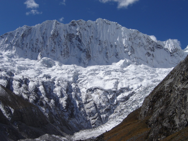 Foto tomada en julio del 2007 en la quebrada LLaca, Cordillera Blanca, Áncash - Perú.